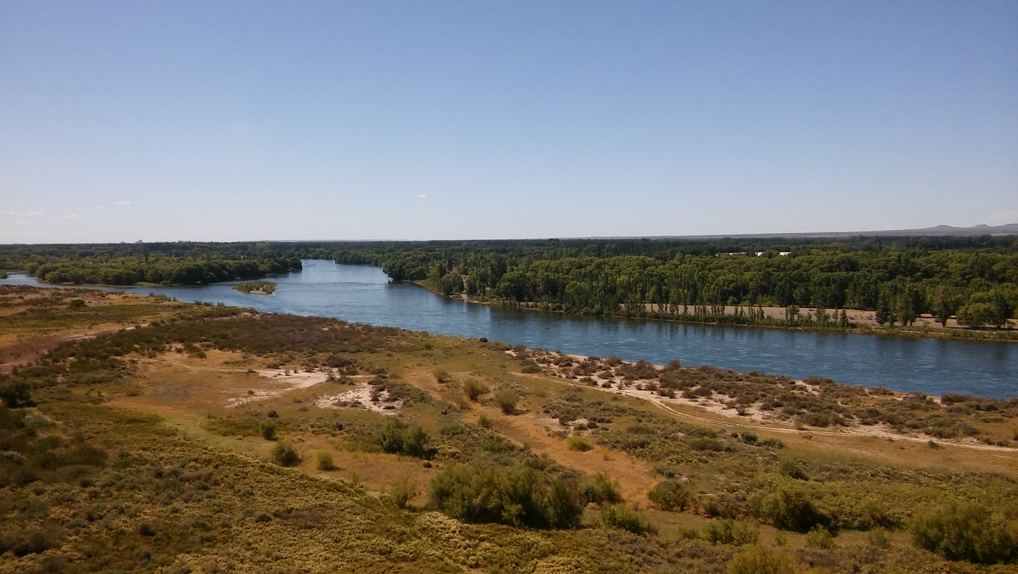 La Isla Jordán un lugar que tiene mucha Naturaleza para compartir